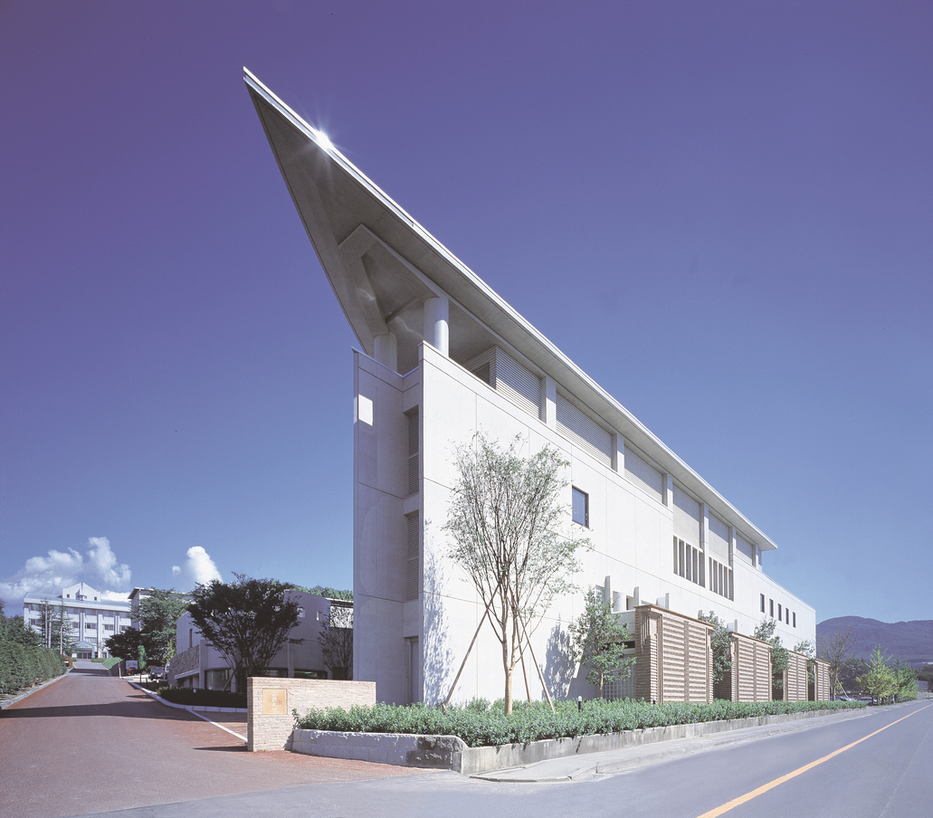 Nagano Univ picture